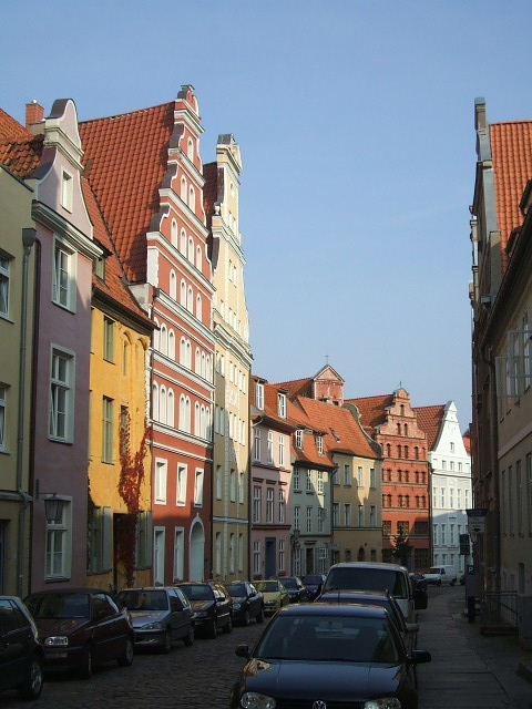 Stralsund,_Germany,_Fährstraße von Külpstraße _(2006-09-29)